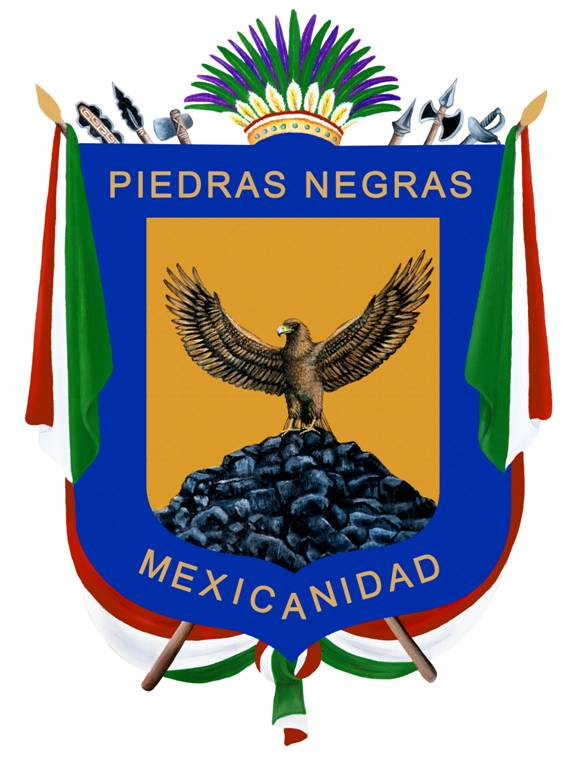 Escudo de Armas de Piedras Negras, Coahuila de Zaragoza (modificado en diciembre 2012)